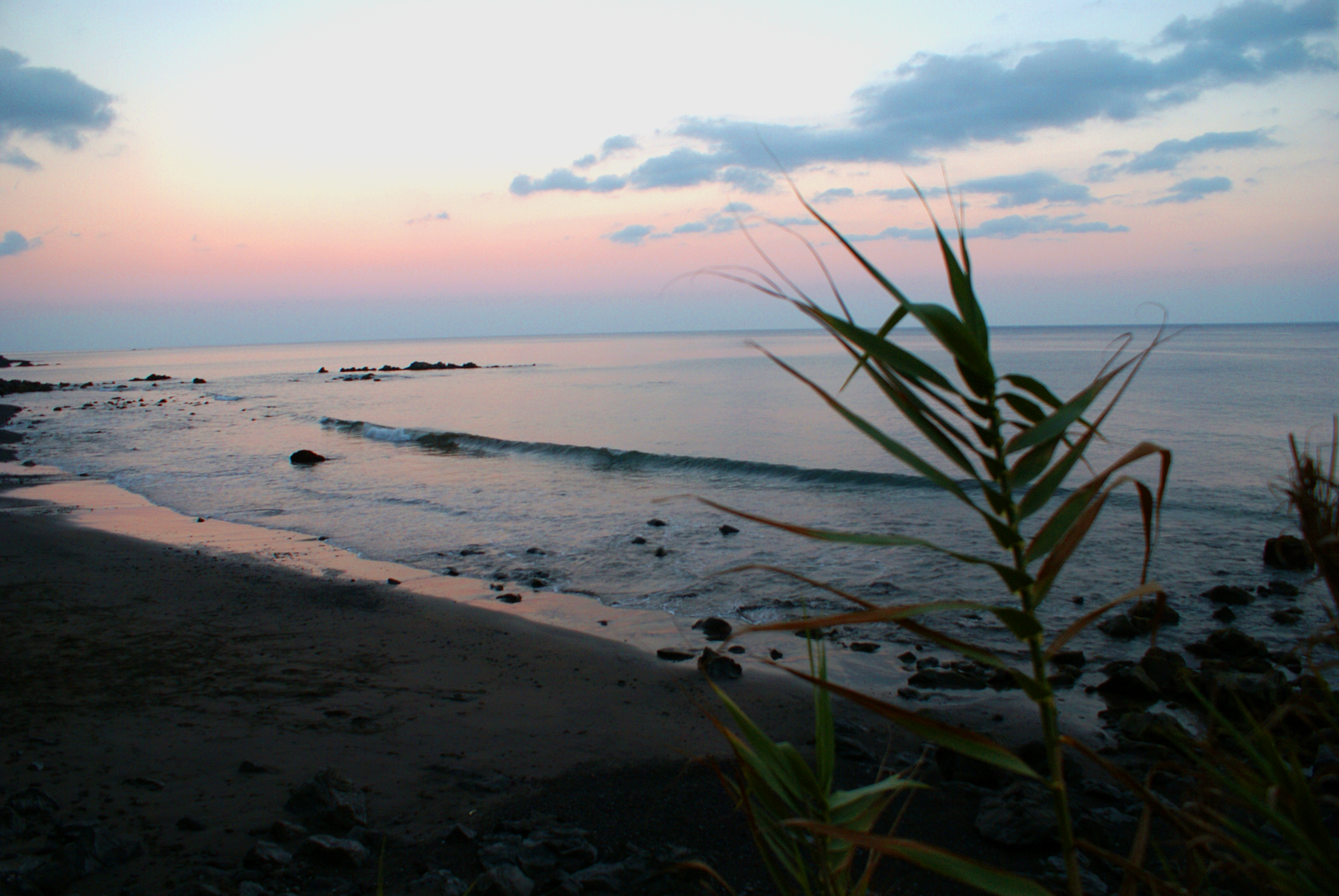 Praia da Amora, o Sol vai dormir, Ponta Garça, ilha de São Miguel, Açores